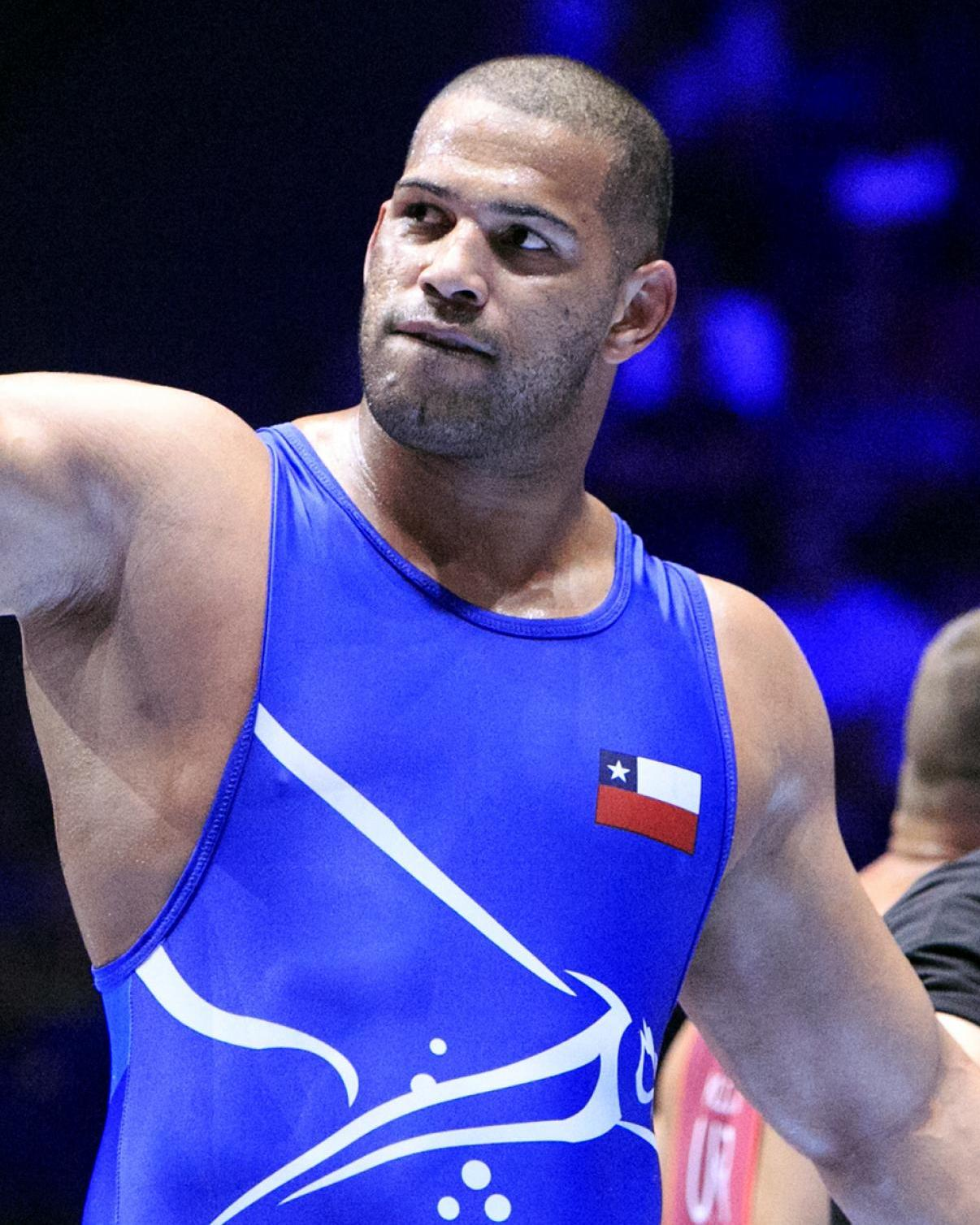 Campeonato Mundial de Lucha Olímpica